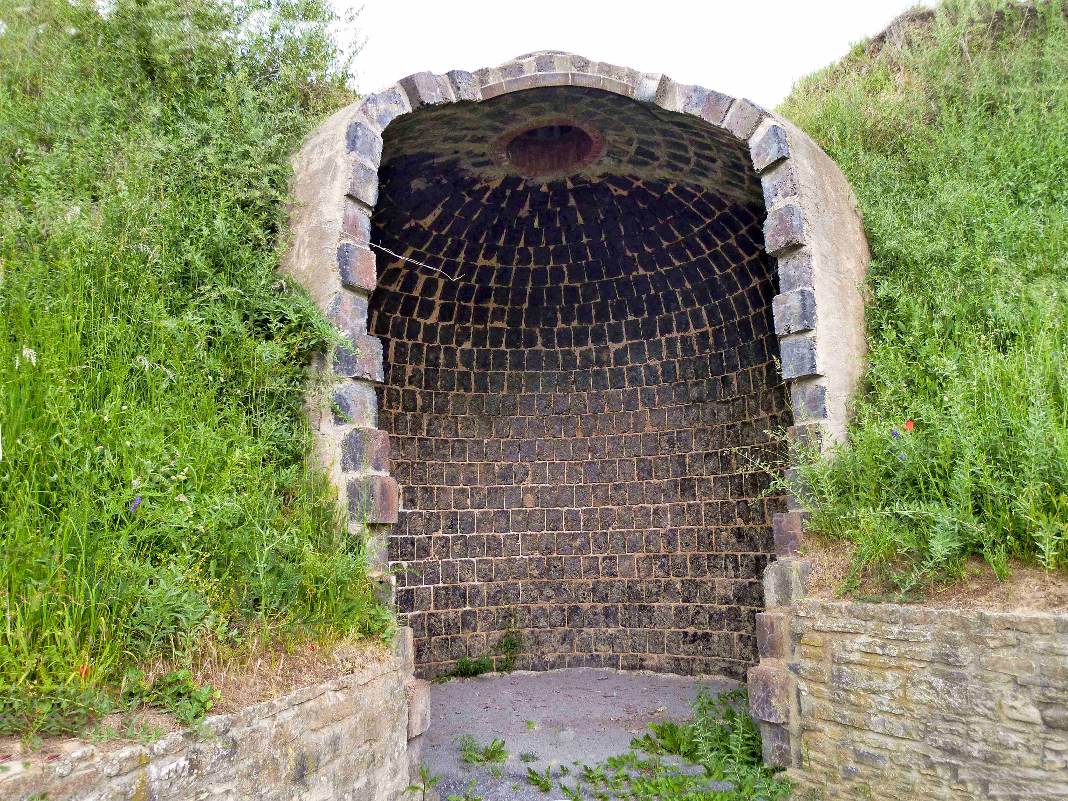 Die Kornflaschen in der Gemeinde Friedeburgerhütte